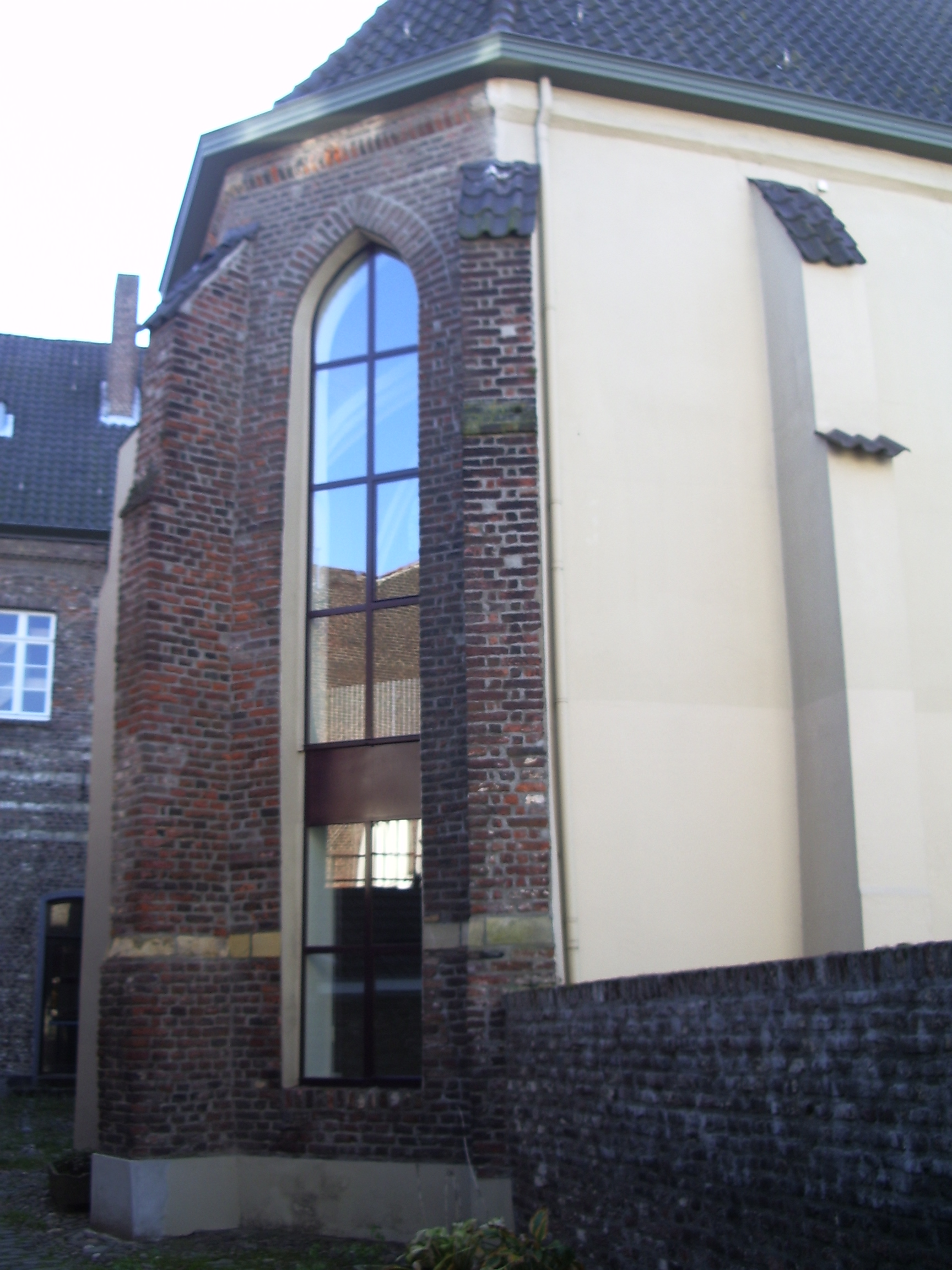 Beggardenkapel Roermond